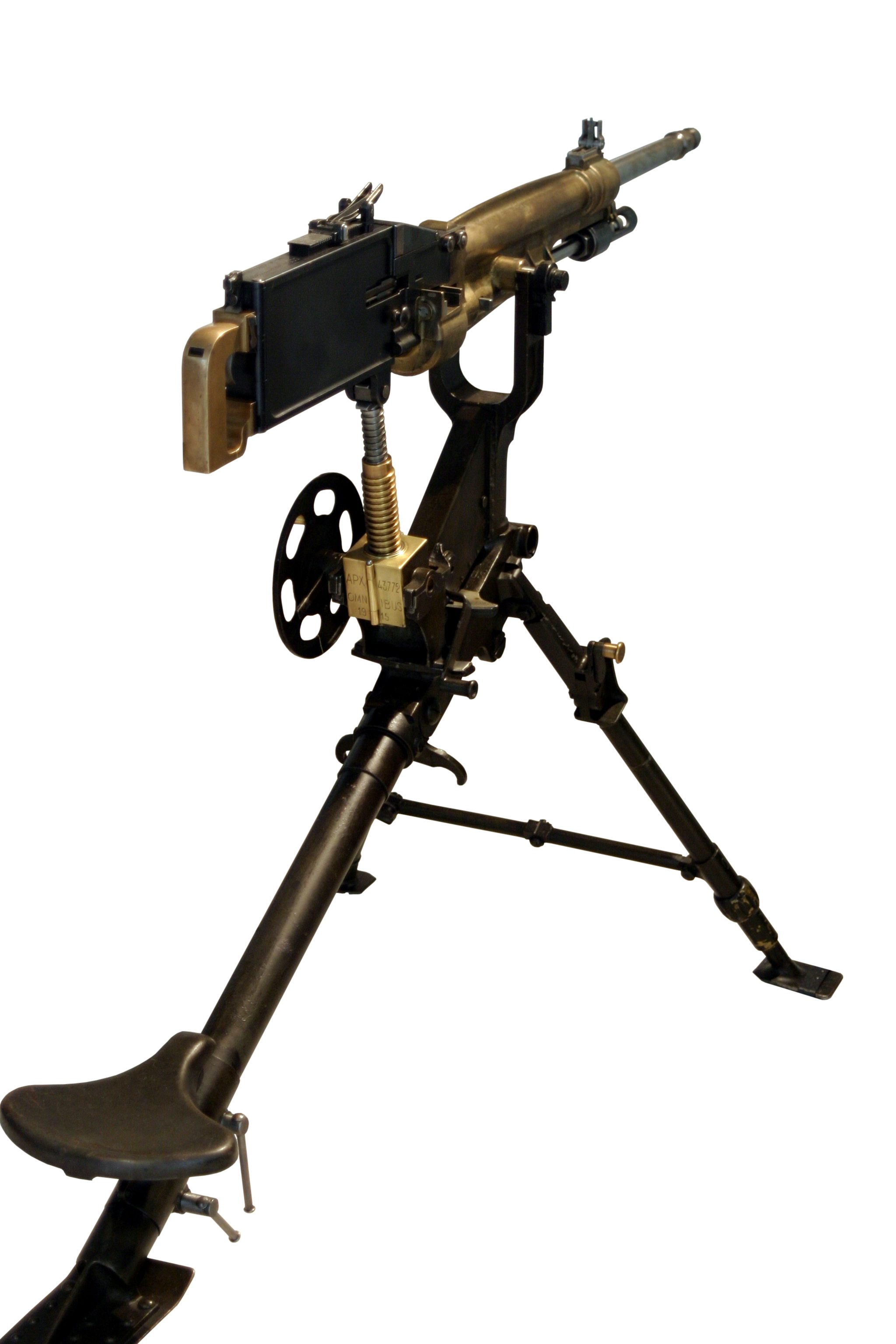 The St Etienne Mle 1907 machine gun. This image was taken at the Musée de l'Armée, Paris.